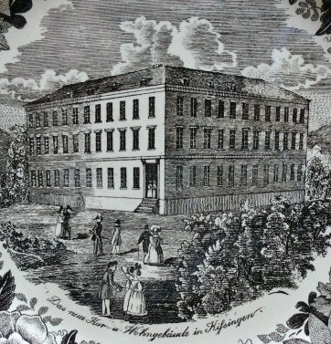 Wohnhaus in Bad Kissingen, 1835/36 erbaut von Johann Gottfried Gutensohn; heute südlicher Teil des Hotels "Kaiserhof Victoria"